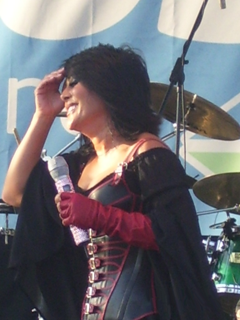 Alejandra Guzmán durante la inuguración del macrobús de Guadalajara, México.